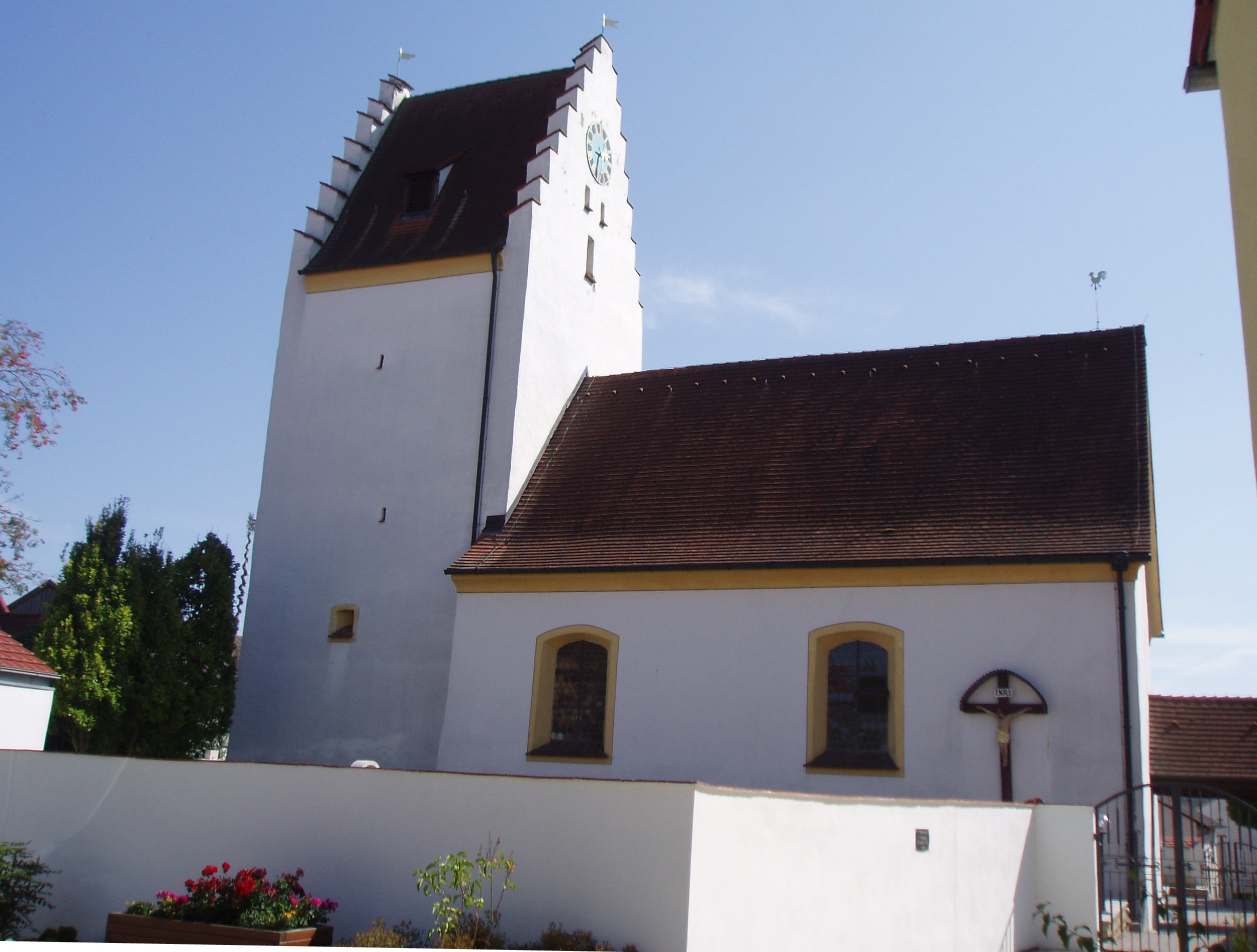 Hirnstetten_im_Landkreis_Eichstätt_Kirche_St._Leonhard